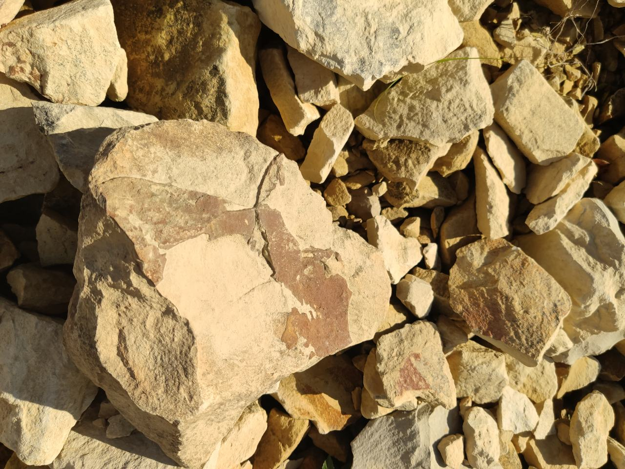 Zlatá opuka bělohorského souvrství v suti v Opukovém lomu u Přední Kopaniny